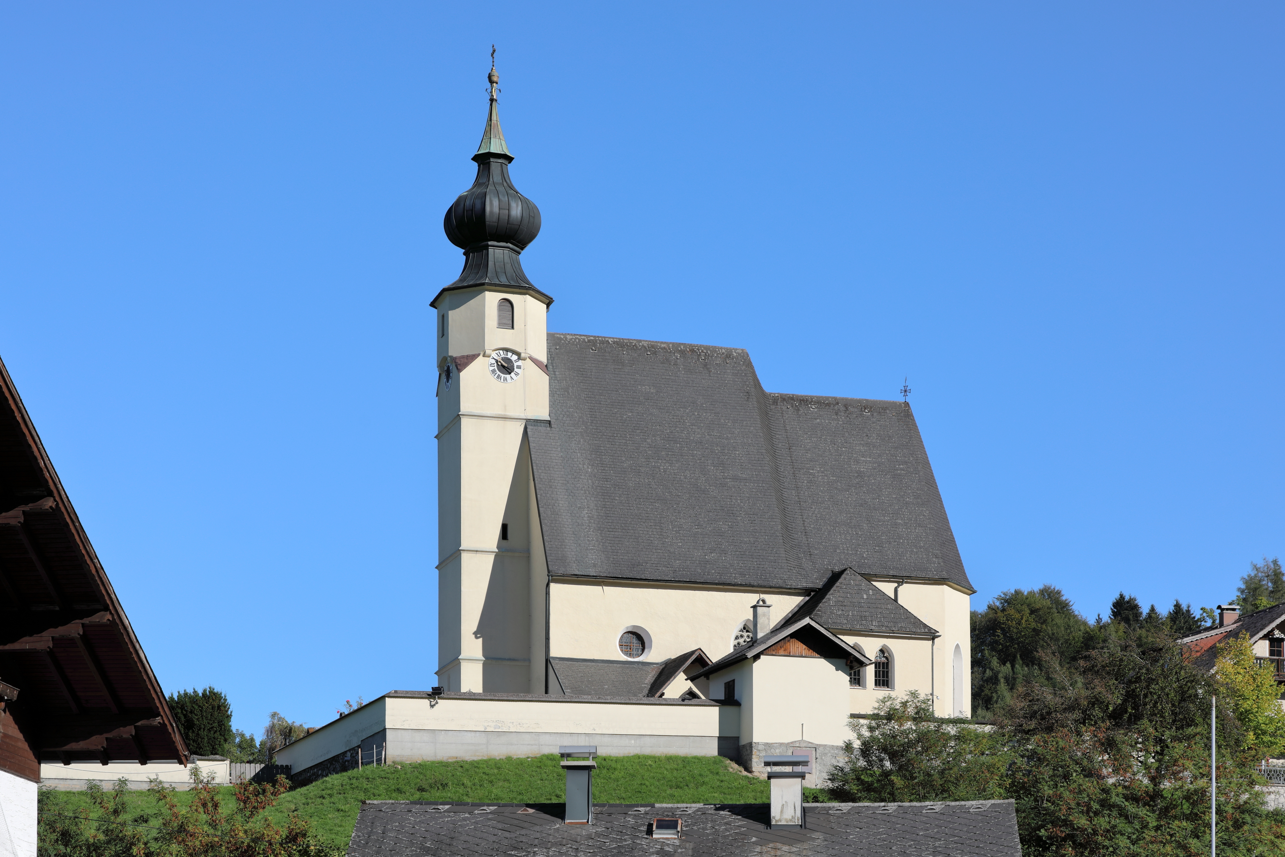 Die röm.-kath. Pfarrkirche hl. Andreas in der oberösterreichischen Gemeinde Steinbach am Attersee. Die Kirche, eine zweischiffige Hallenkirche mit Westturm und Chor mit 5/8-Schluss, wurde 1516 in erhöhter Lage errichtet.